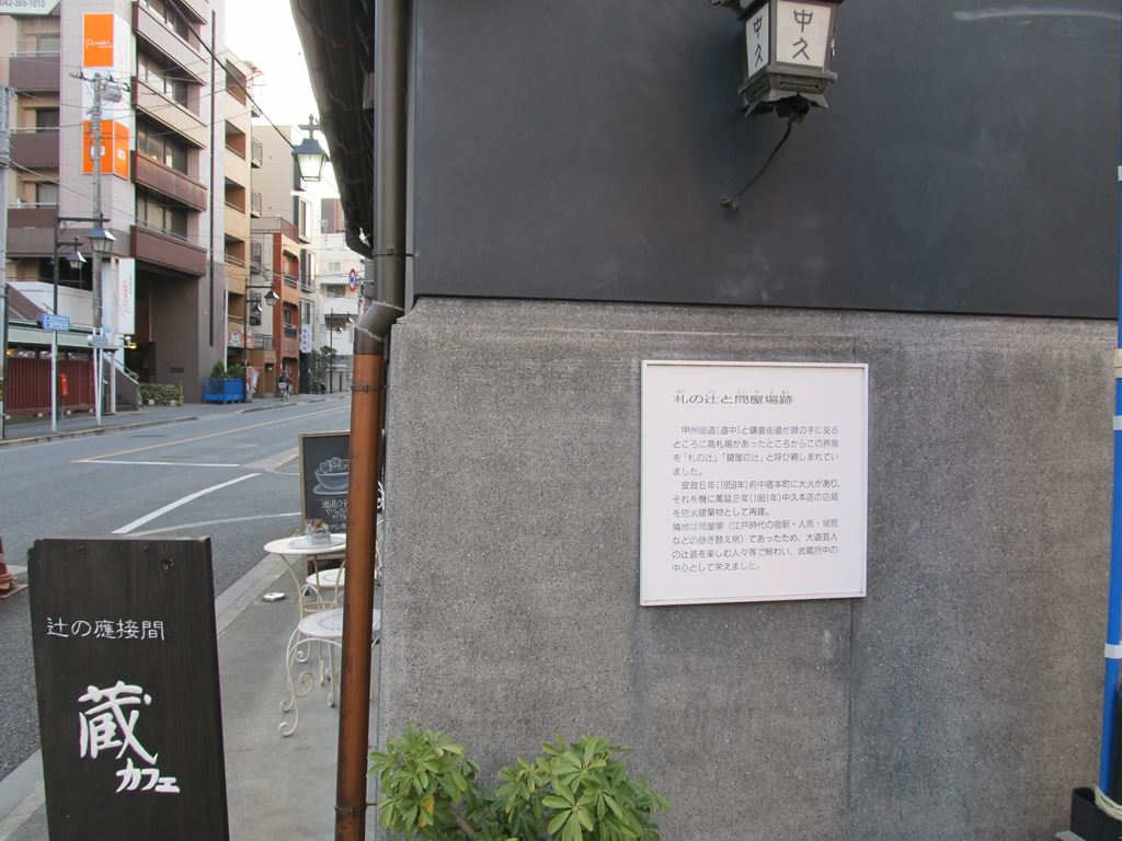 東京都府中市。札ノ辻と問屋場跡。